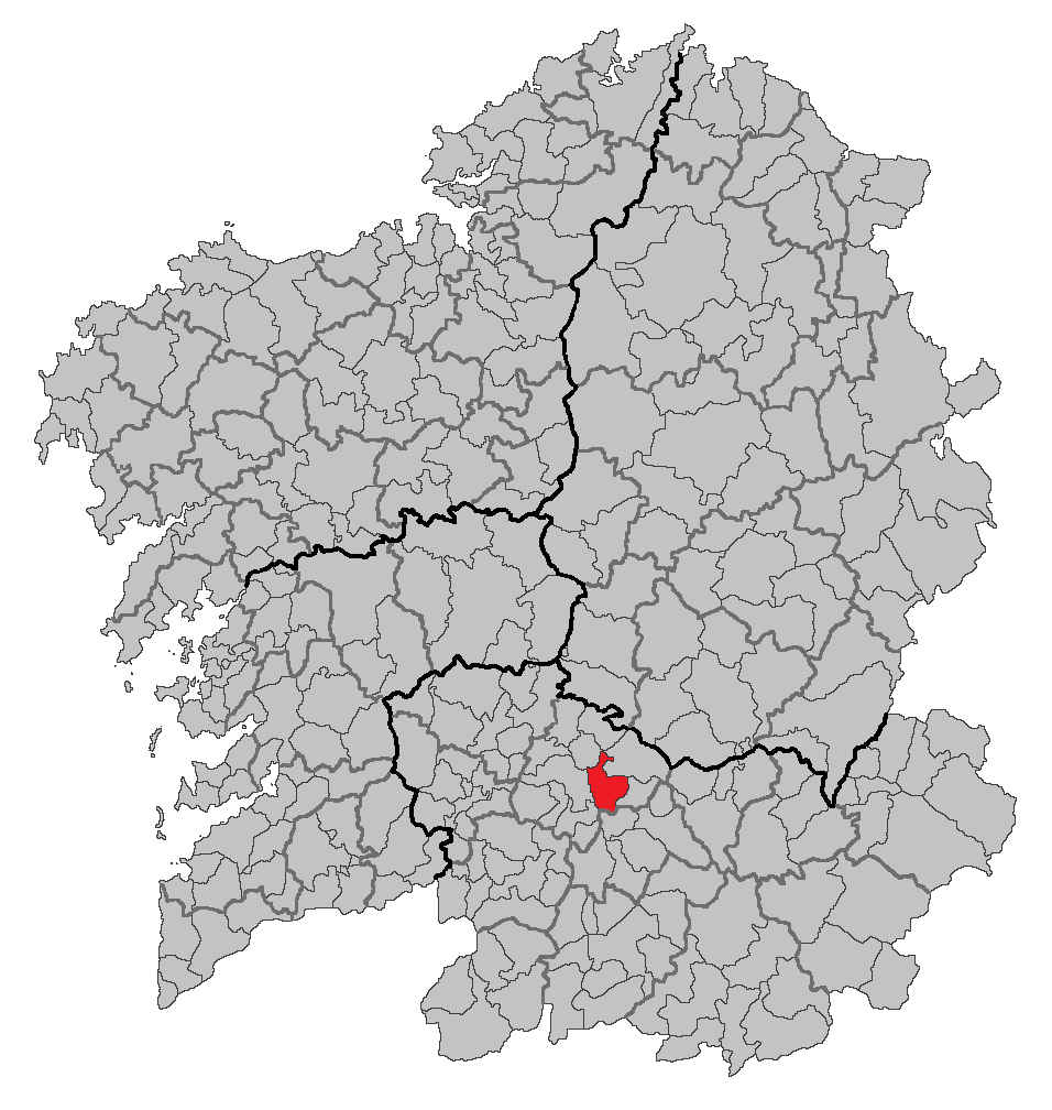 Mapa coa localización do concello de O Pereiro de Aguiar.